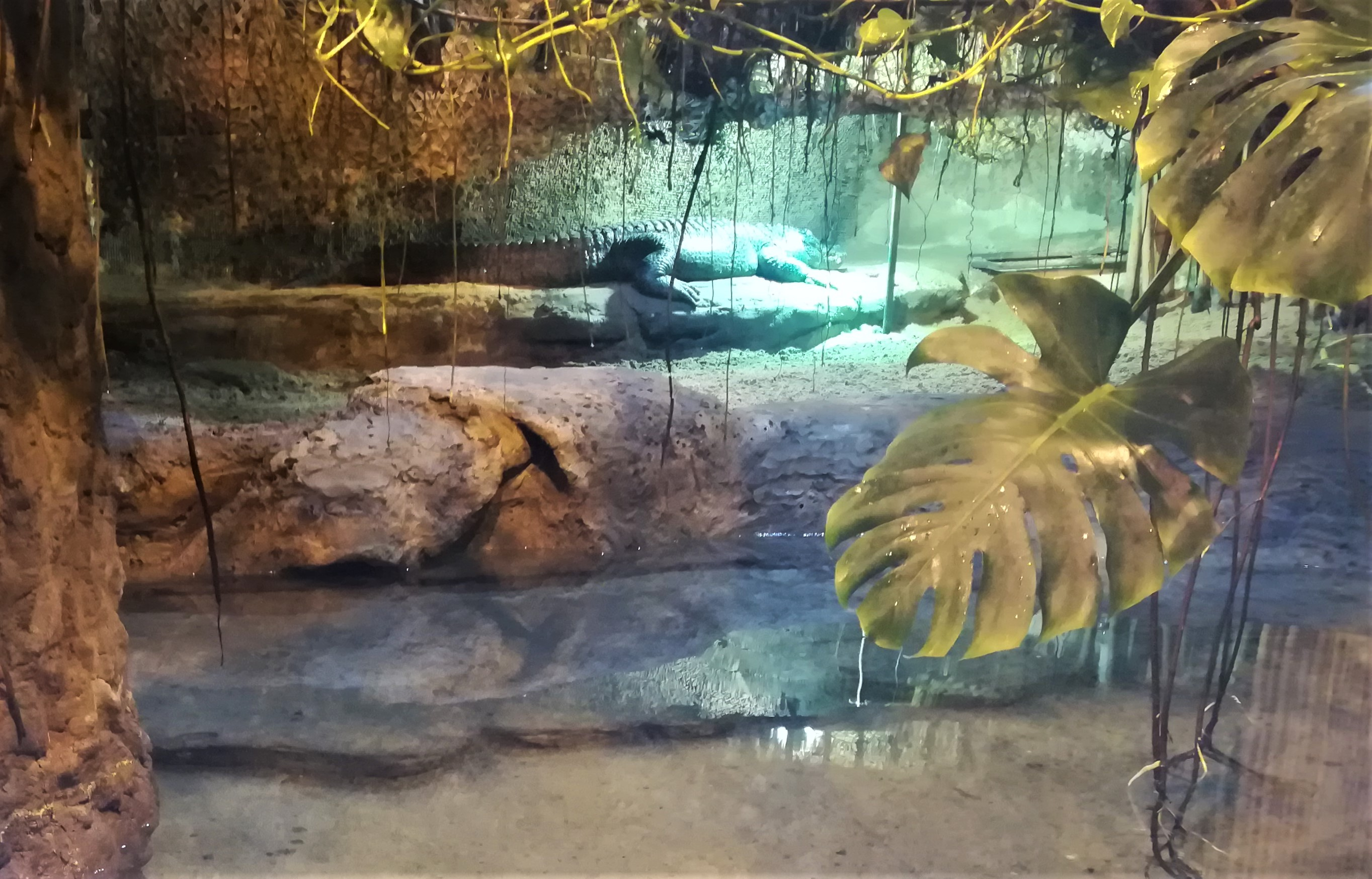 Aligator Marta, który grał w filmie Hydrozagadka. ZOO Płock.